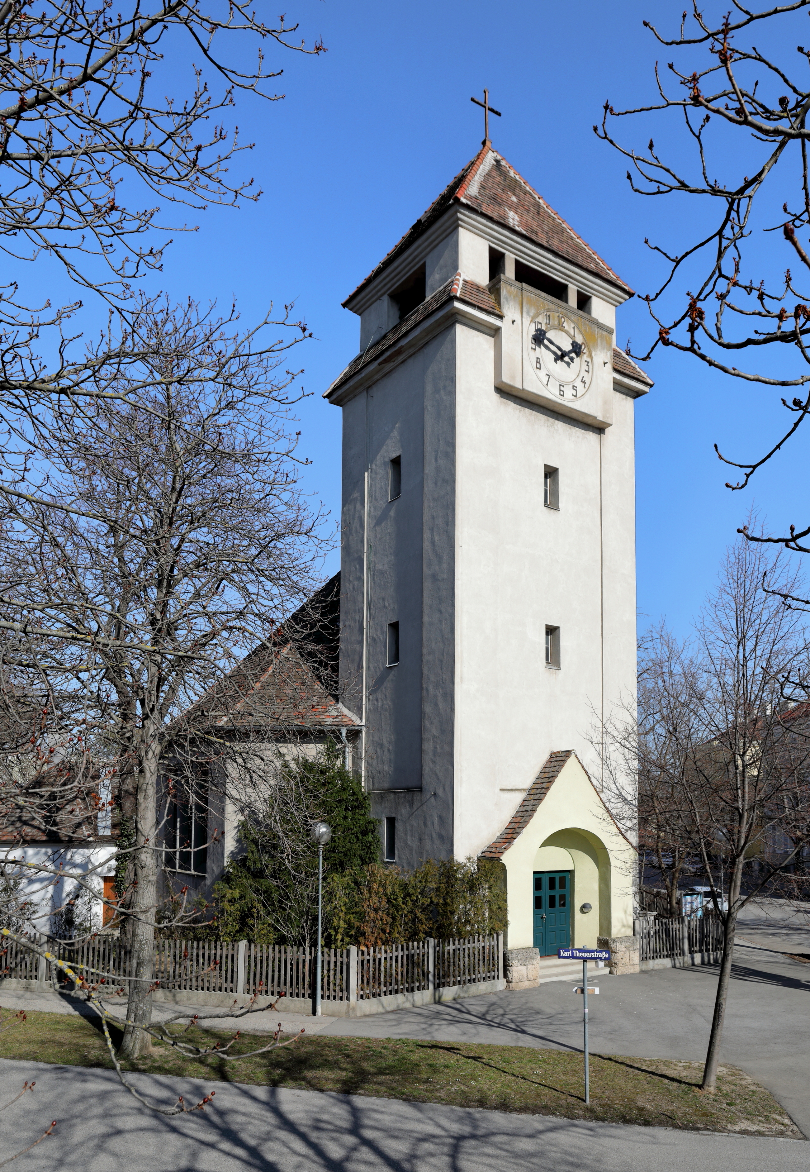 Südwestansicht der evangelischen Kirche in der niederösterreichischen Stadtgemeinde Traiskirchen. Die Kirche mit vorgestelltem Fassadenturm wurde 1913 nach Plänen der Architekten Siegfried Theiss und Hans Jaksch errichtet.